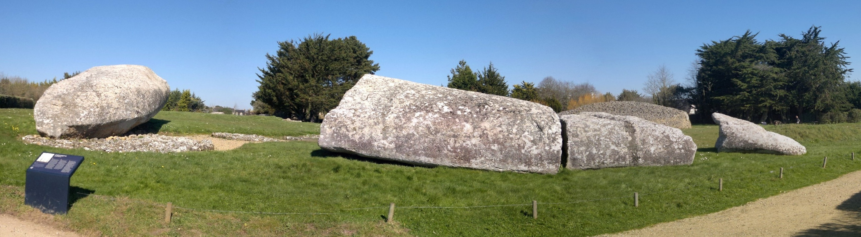 Grand menhir brisé d'Er Grah, Fr-56-Locmariaquer.